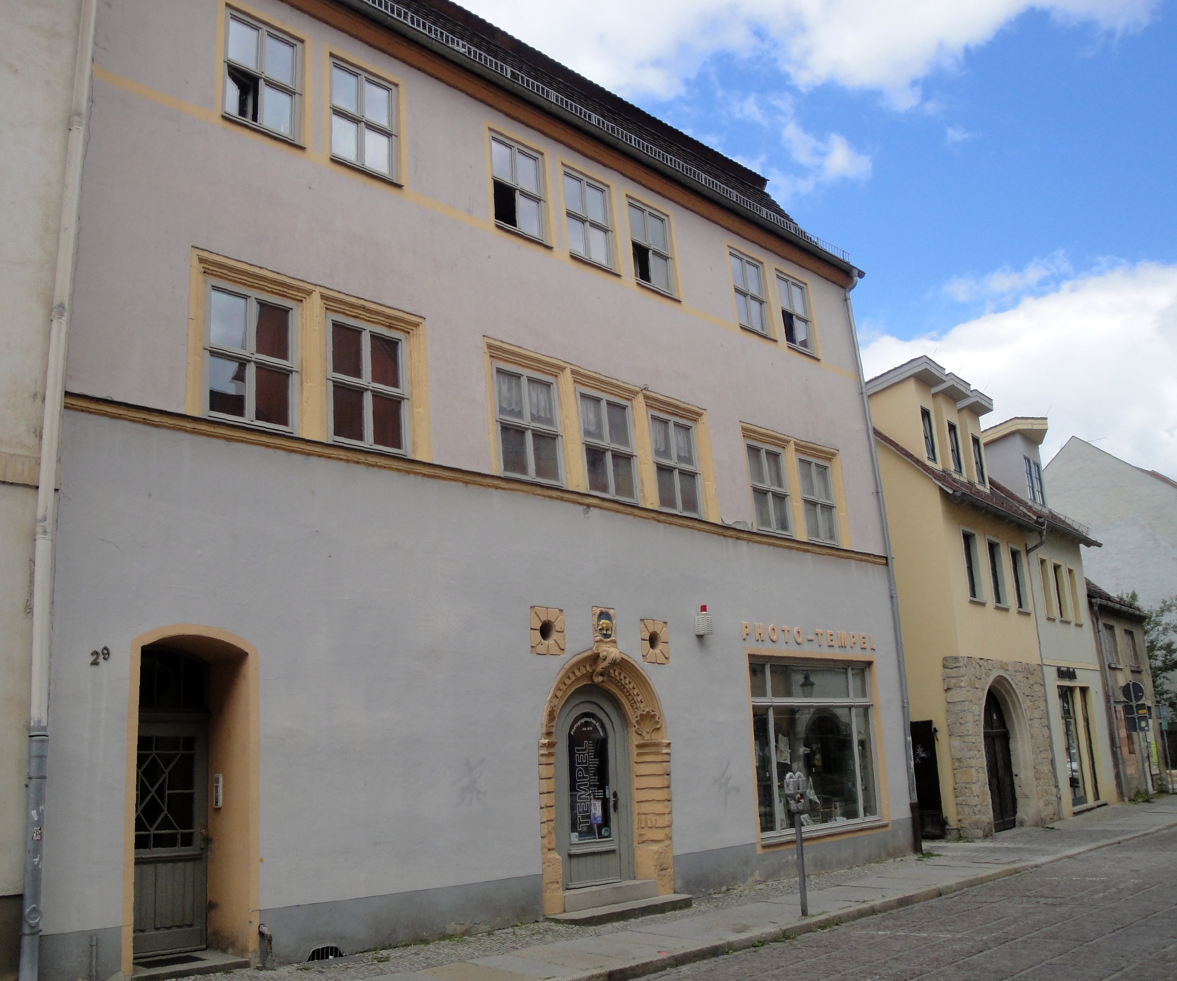 Marienstraße, Naumburg (Saale)